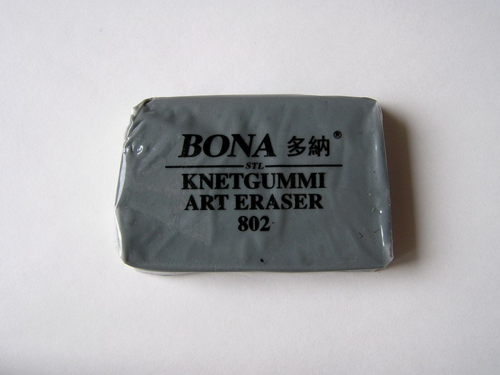 Ластик-Клячка — канцелярская принадлежность для коррекции и осветления угольных и пастельных рисунков, для удаления загрязнений с пленки и кальки.